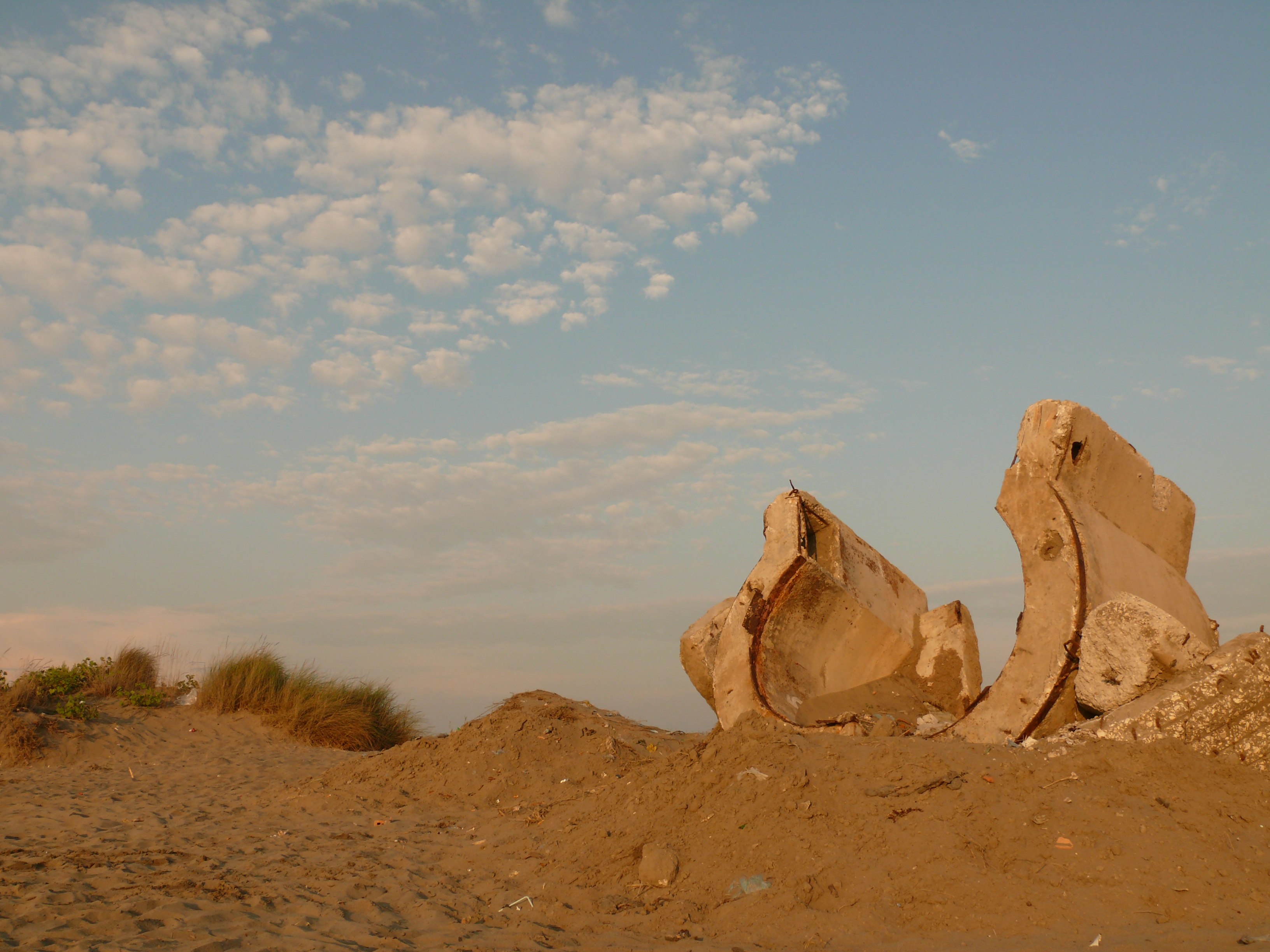 L'un des bunkers renversés sur la plage près de Seman (Fier, Albania), en 2009.